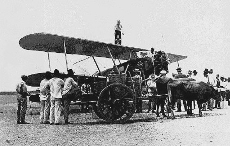 Avión respostando combustible en San Jerónimo, Baja Verapaz en 1928.